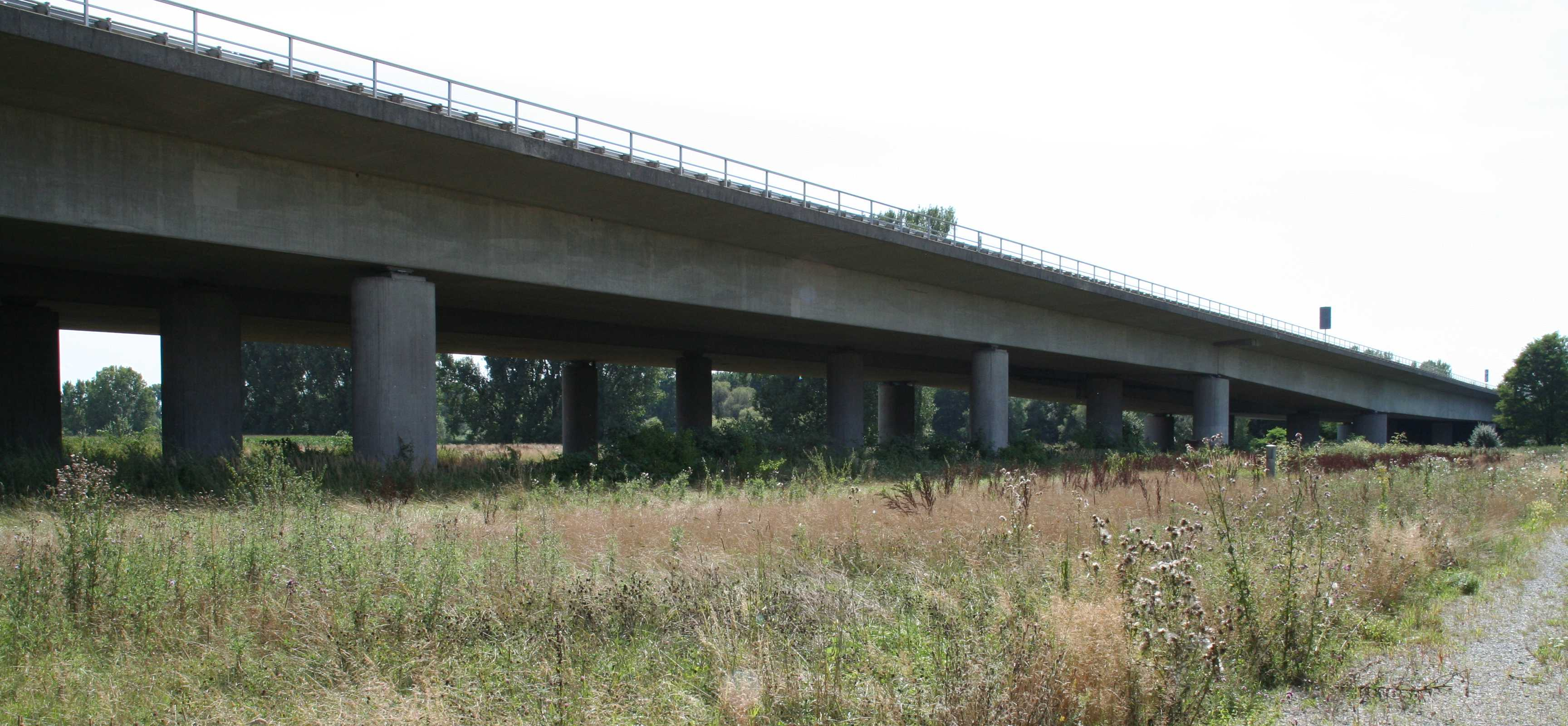 Nordseite der Mainbrücke Mainflingen bei Mainhausen/Kleinostheim